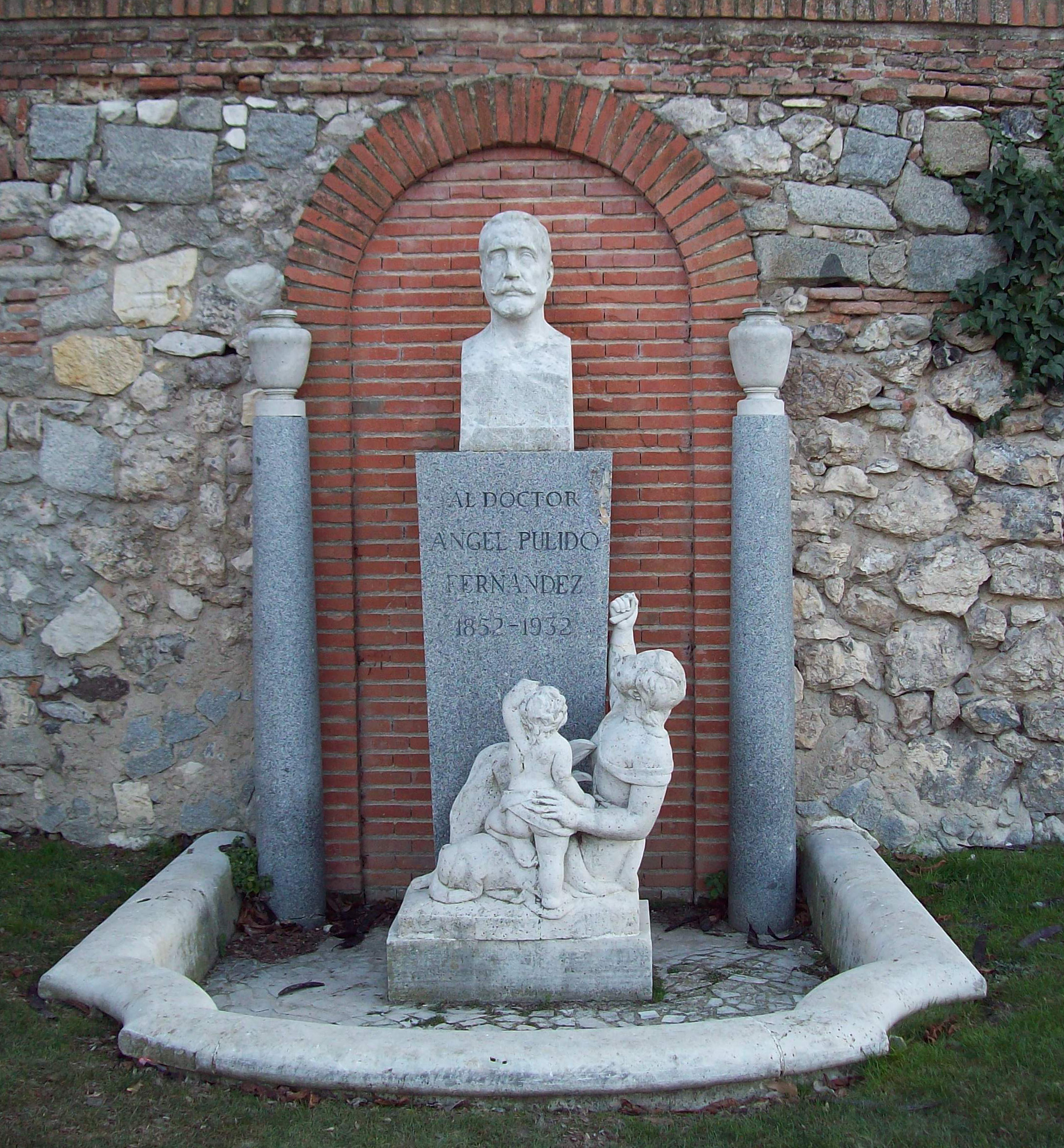 Monument to Ángel Pulido Fernández.